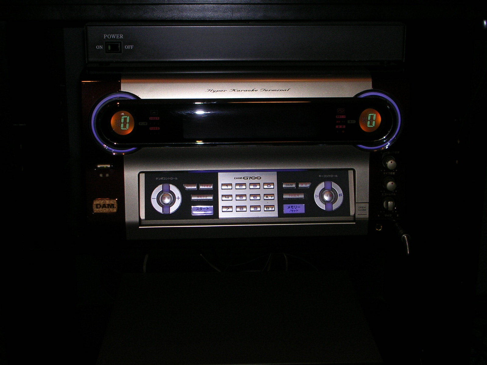 DAM Karaoke system(DAM-G100)